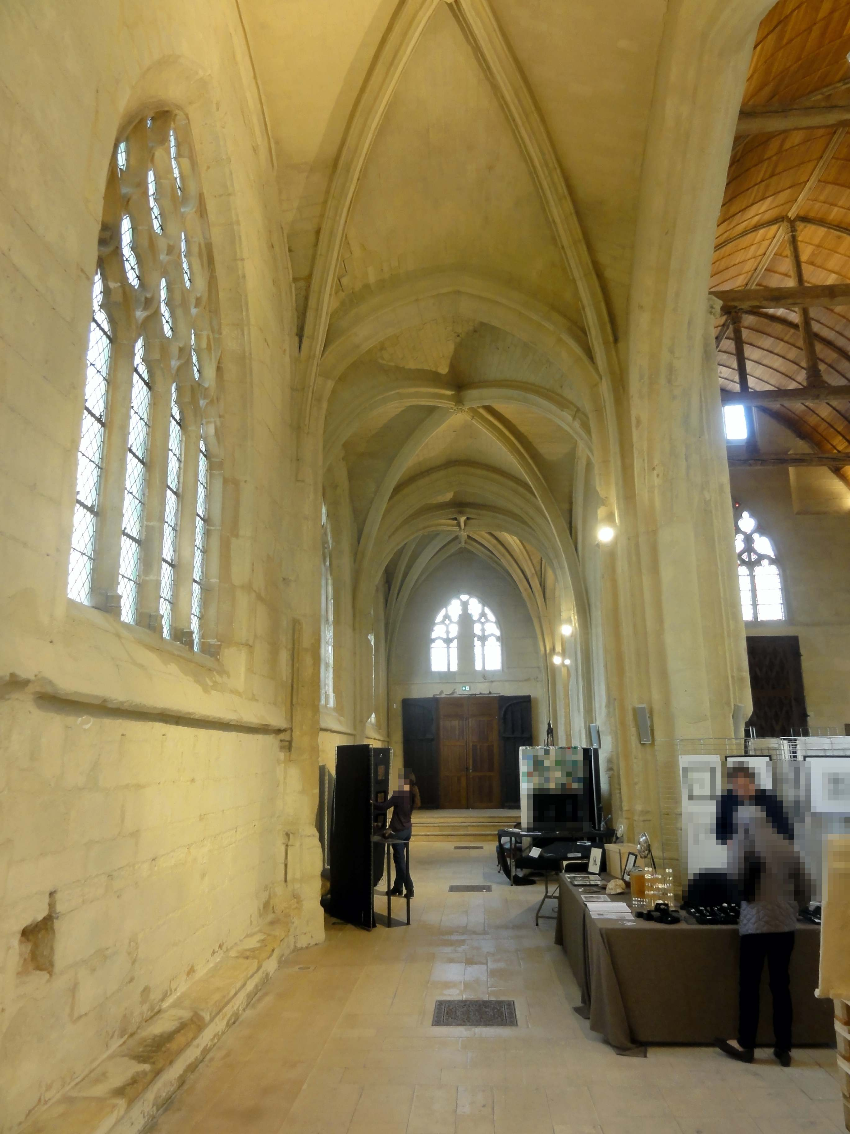 Intérieur de l'église - voir titre.